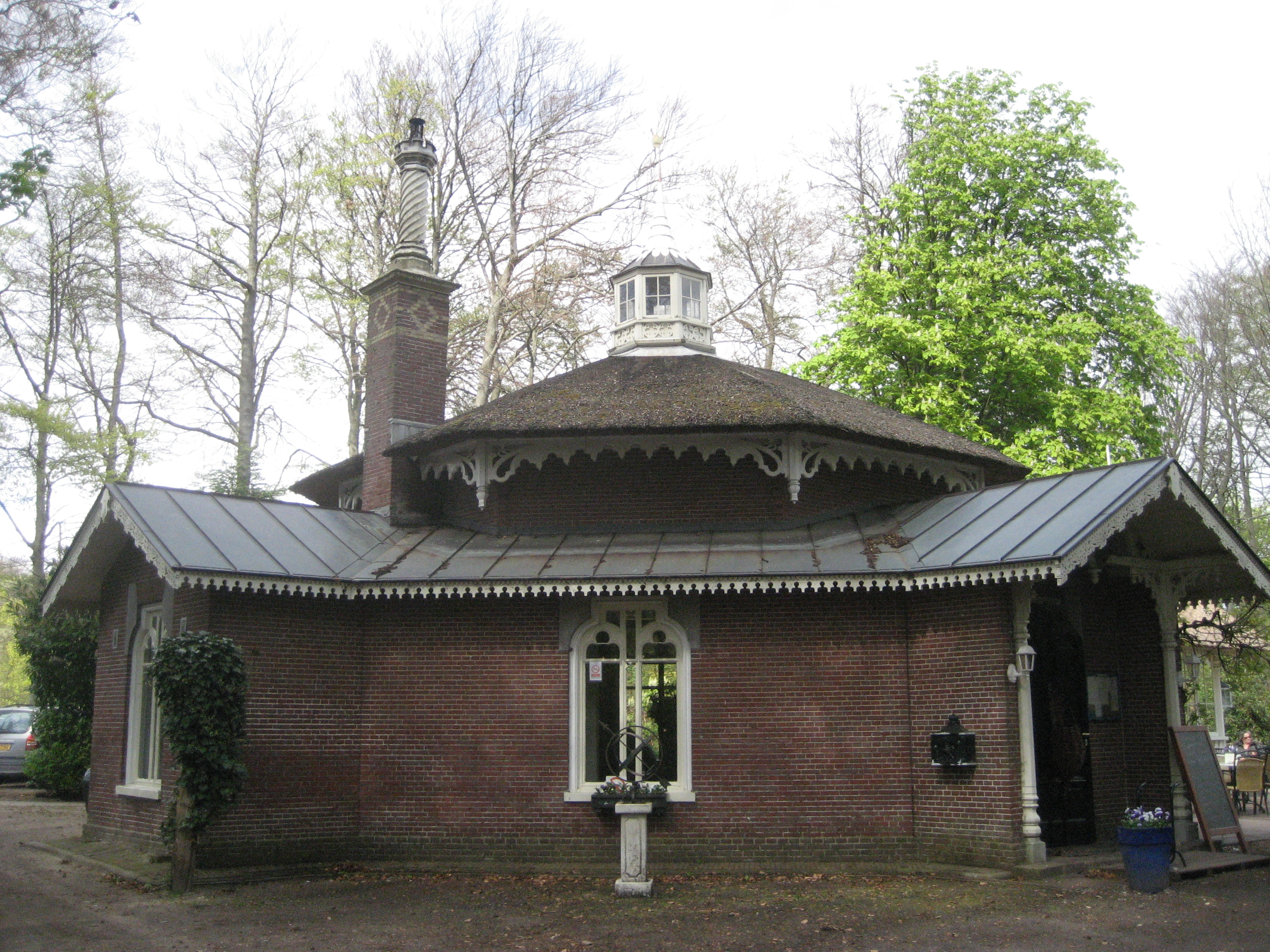 Landgoed De Horsten, Wassenaar/Voorschoten. Theehuis (vroeger jachthuis of schiethuis genoemd. Architect H.H.A. Wentzel)